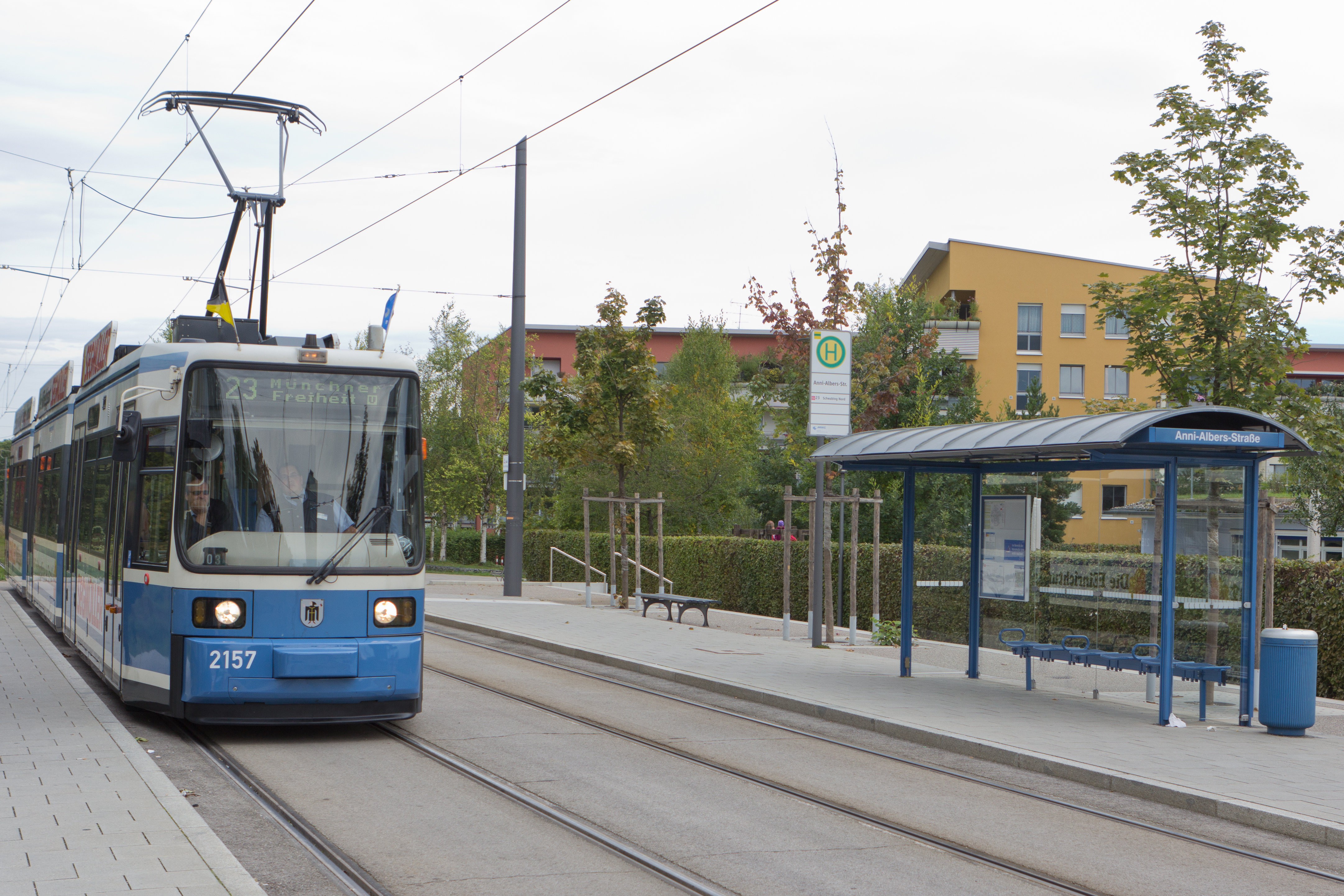 Tramway de Munich (station Anni-Albers-Strasse), Munich, Bavière, Allemagne